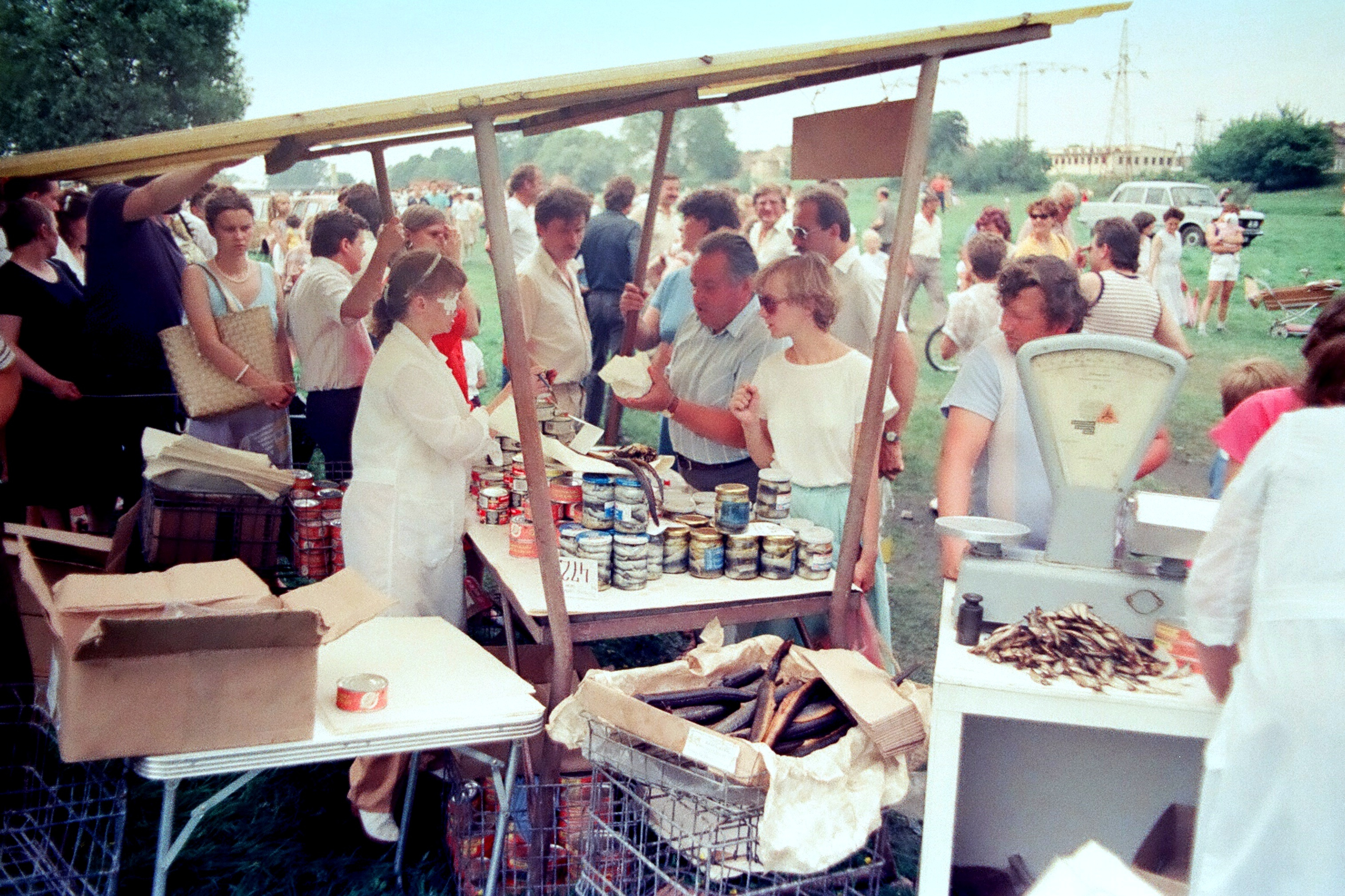 Z okazji święta 22 lipca (Narodowe Święto Odrodzenia Polski) organizowano festyny podczas których można było kupić artykuły spożywcze niedostępne na co dzień. Gorzów Wlkp. w 1984 r.